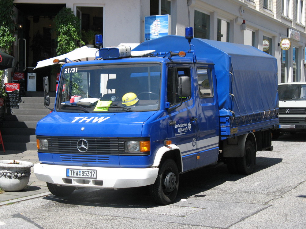 MLW I des Technischen Hilfswerk (THW) des Ortsverband (OV) Bad Oldesloe Typ Mercedes Benz 508D